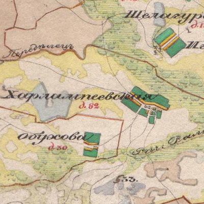 Деревня Харлампеево на карте 1850 года